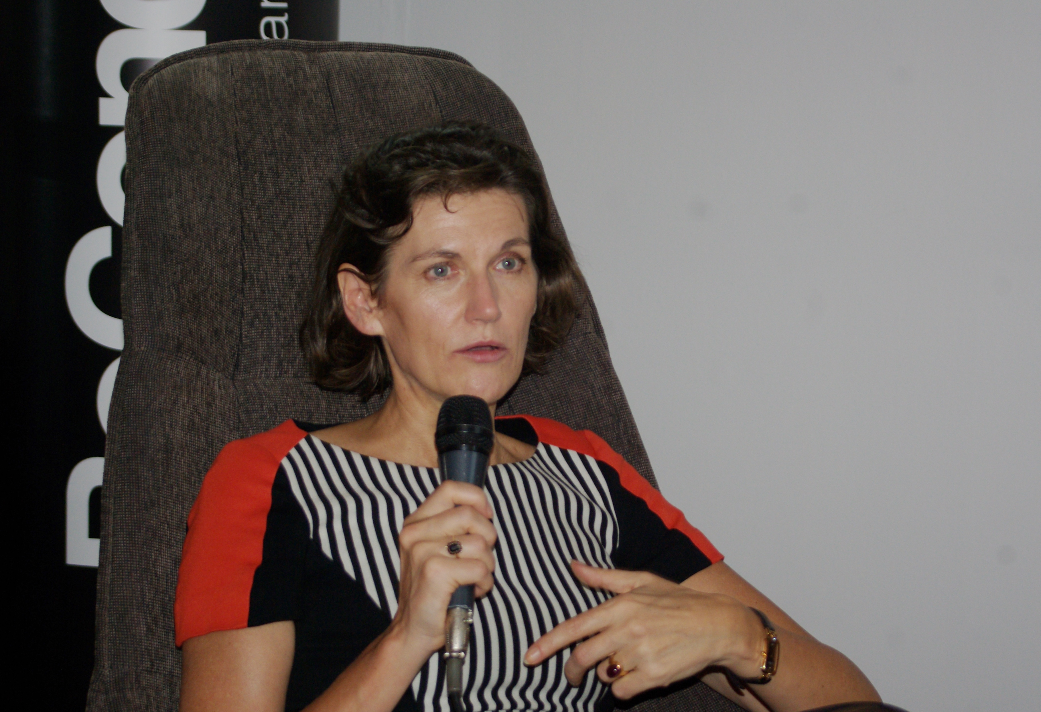 La escritora danesa Janne Teller en la Feria Internacional del Libro de Santiago 2015